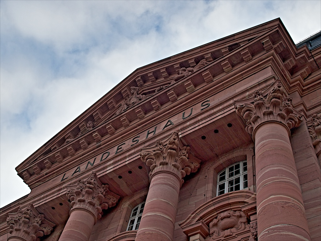 Fassade des Landeshauses